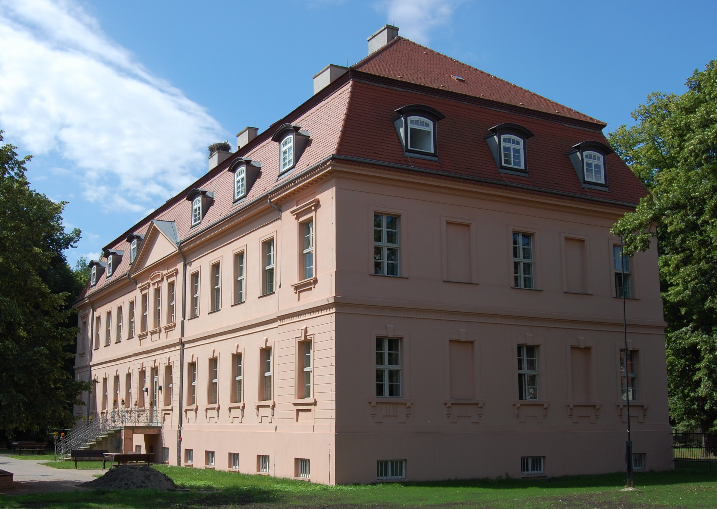 Schloss Straupitz